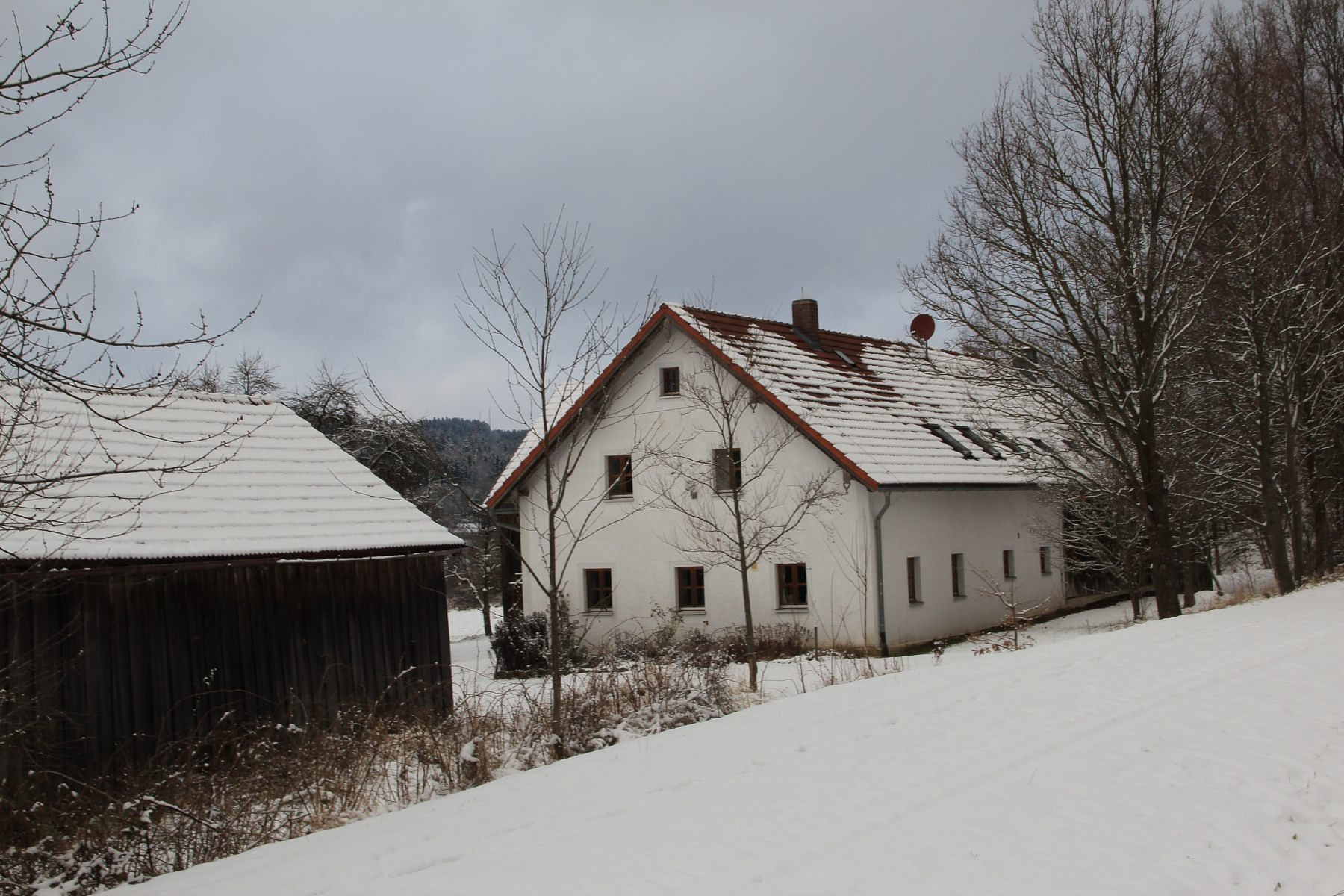 Buchhof, ;arkt Winklarn